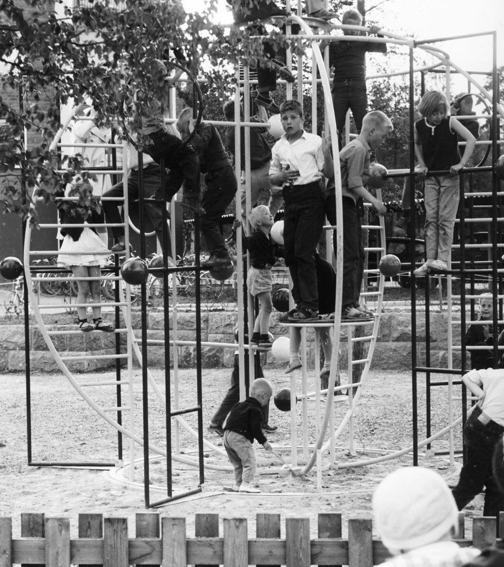 En ny klätterställning, konstruerad av konstnären Ingemar Callenberg från Luleå, sätts på plats på Örnäset den 6 juni 1963.